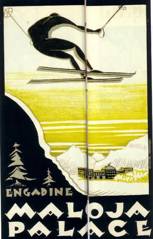 Maloja Palace Hotel luggage tag